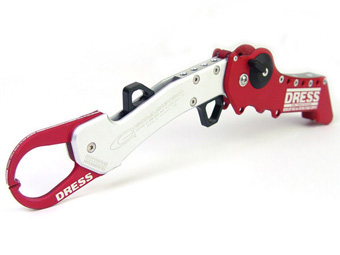 GRASPER GRIP